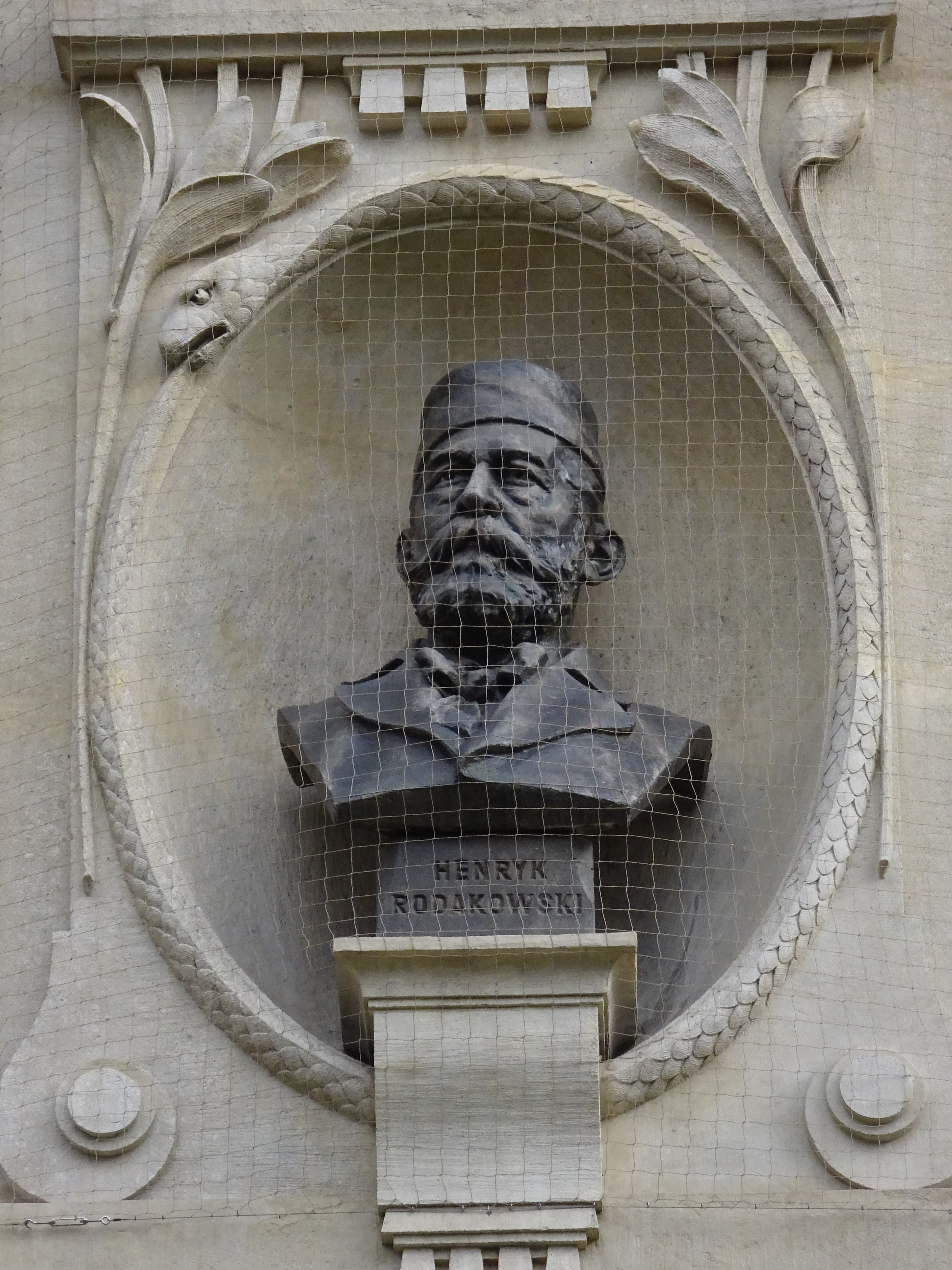 Popiersie Henryka Rodakowskiego na zachodniej elewacji Pałacu Sztuki w Krakowie. 2016